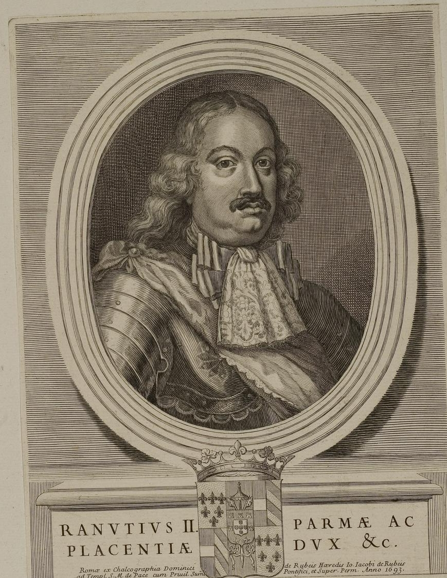 Grafik aus dem Klebeband Nr. 1 der Fürstlich Waldeckschen Hofbibliothek Arolsen Motiv: Ranuccio II. Farnese, Herzog von Parma und Piacenza